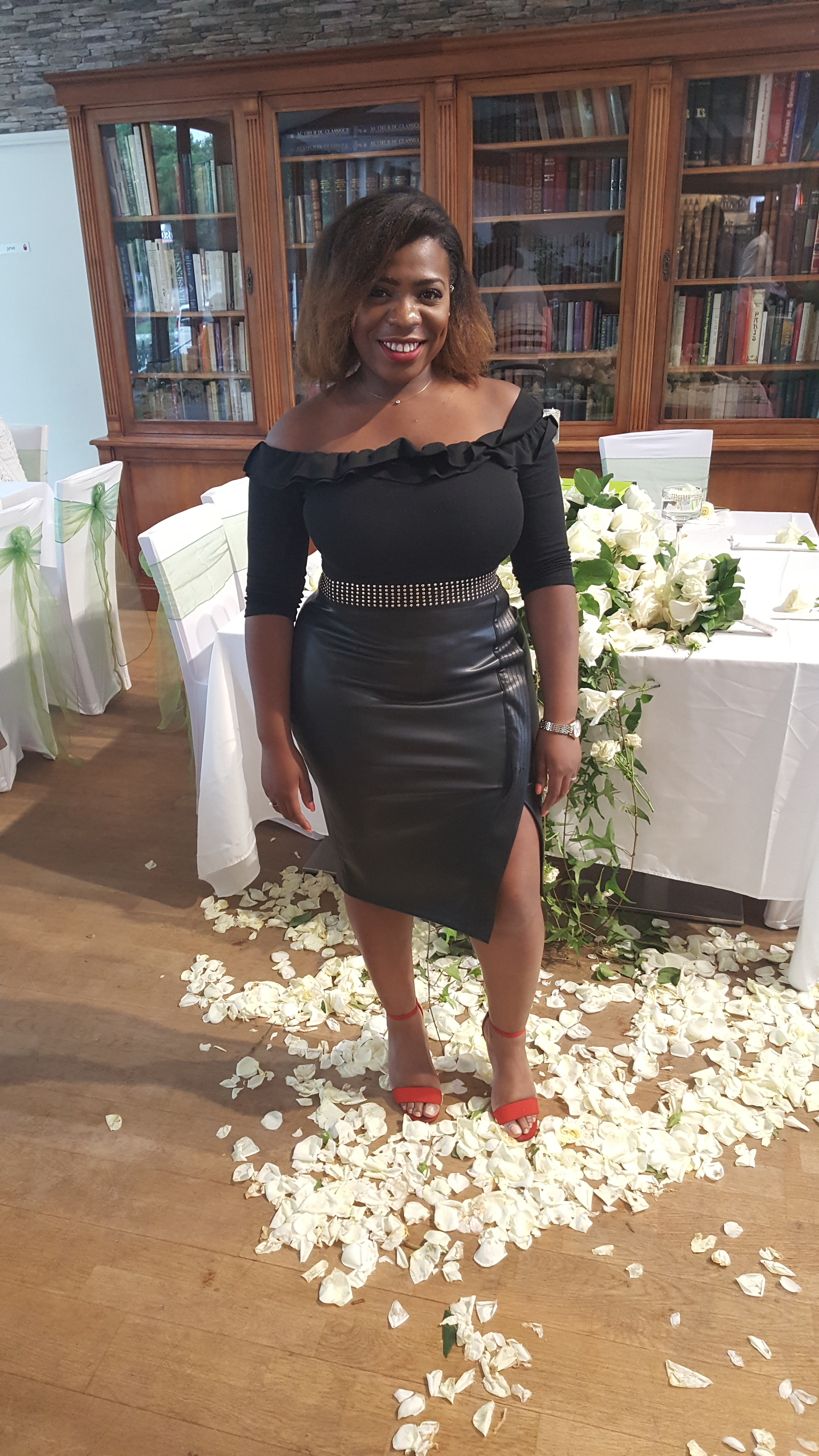 L'actrice française Irina Muluile